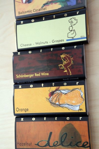 kleine Auswahl an Schokoladentafeln der Schokoladenmanufaktur Zotter